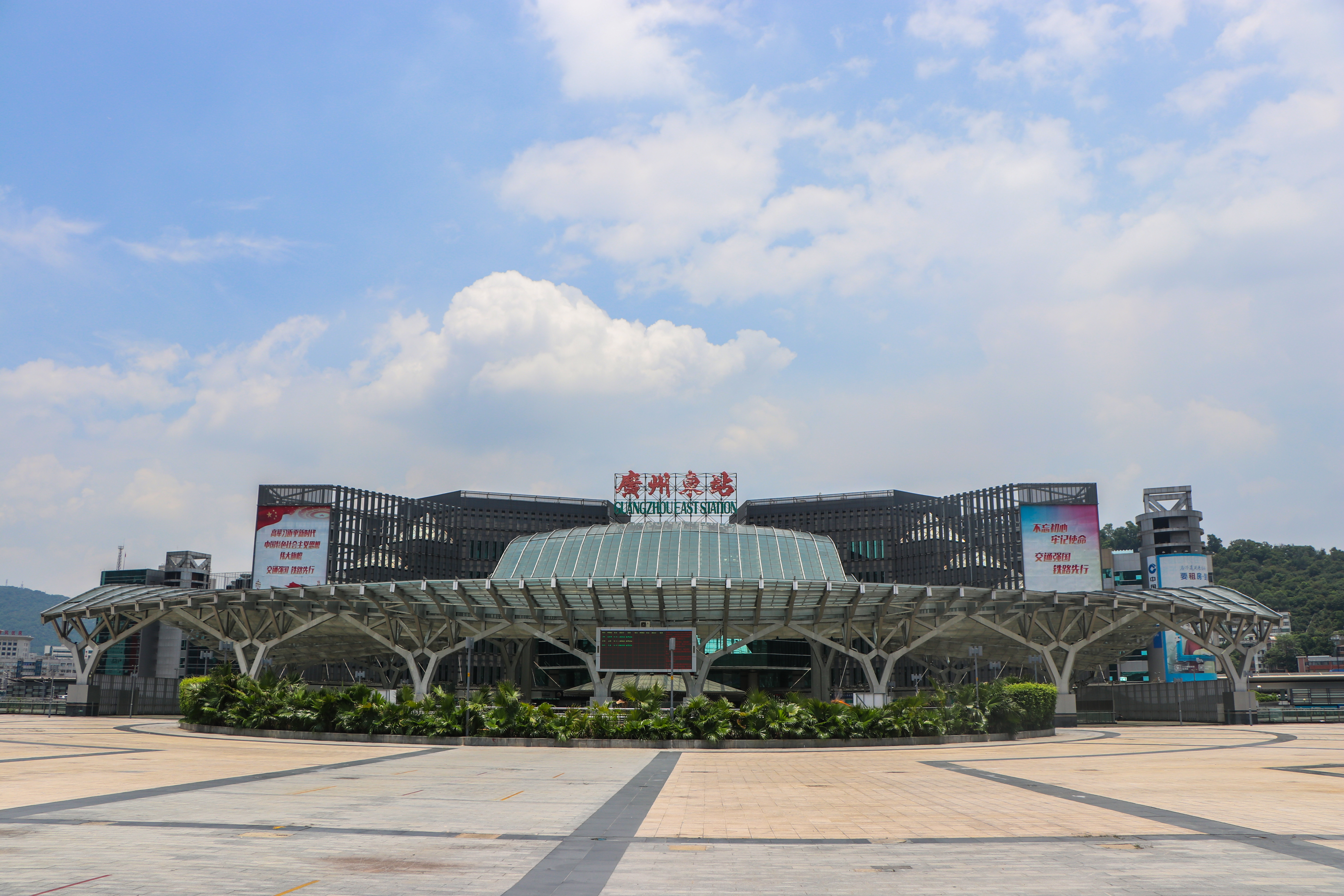 广州火车东站